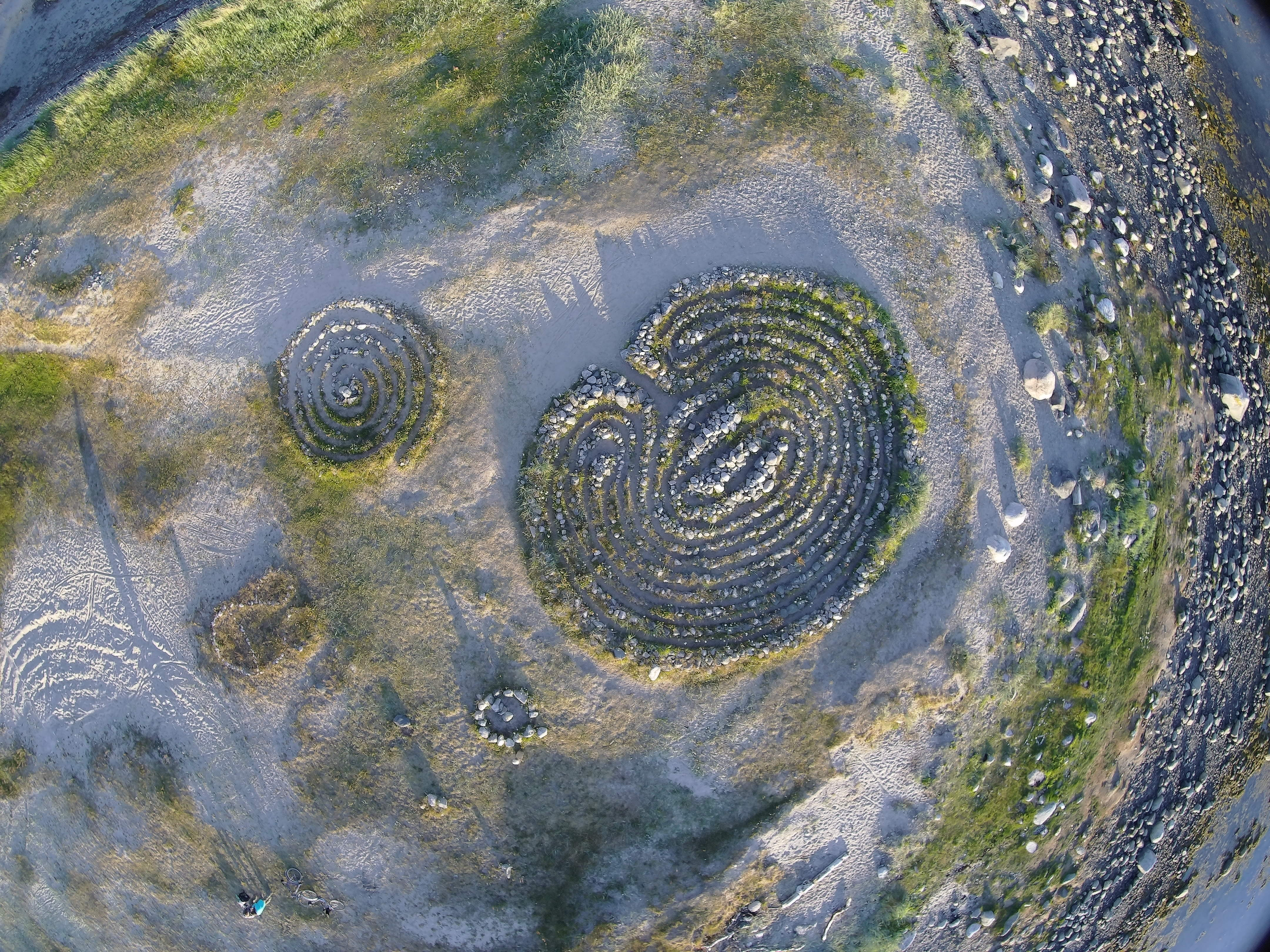 Kamenný labyrint na Velkém soloveckém ostrově